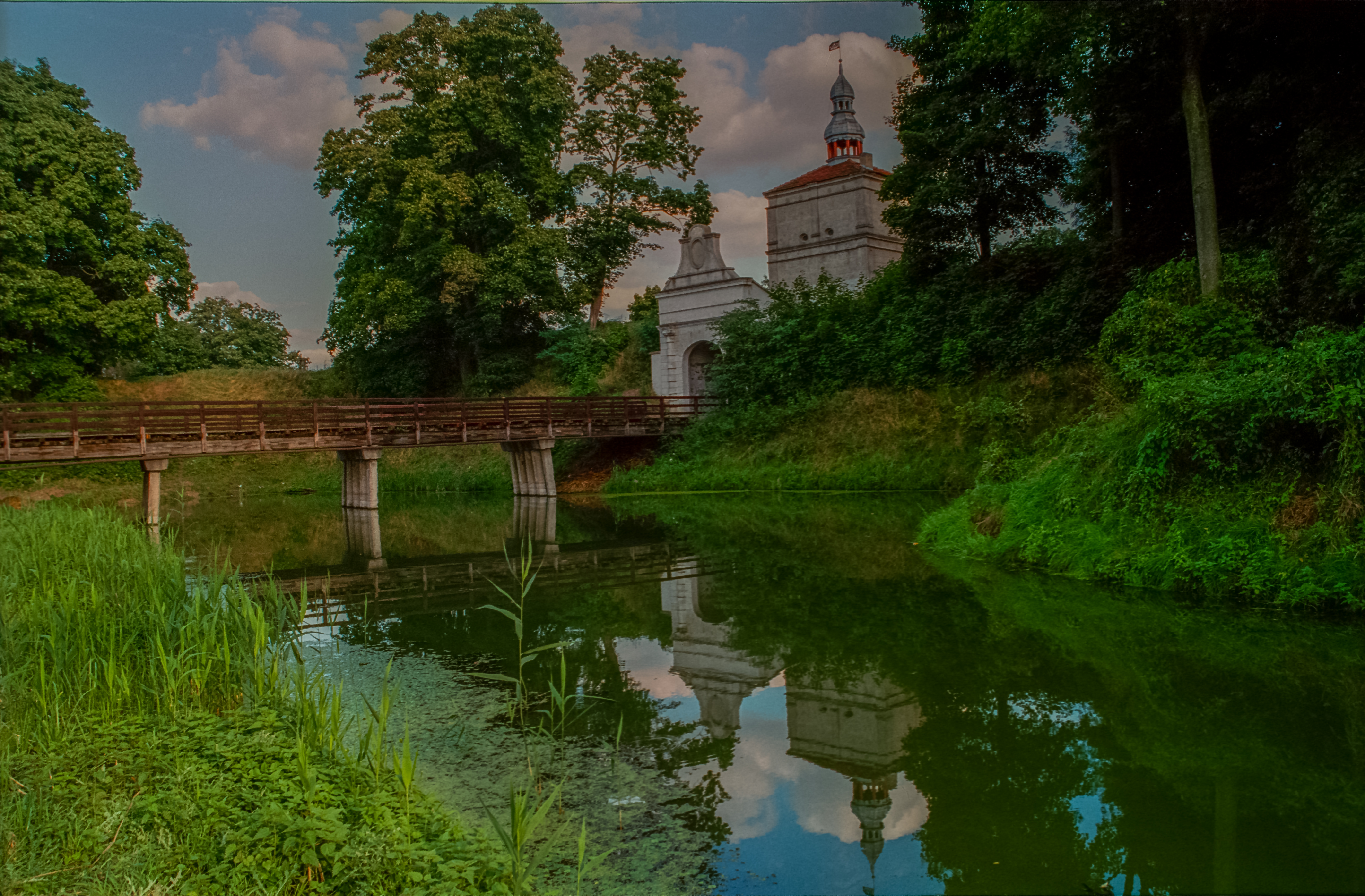 Poland, Zbaszyn Castle